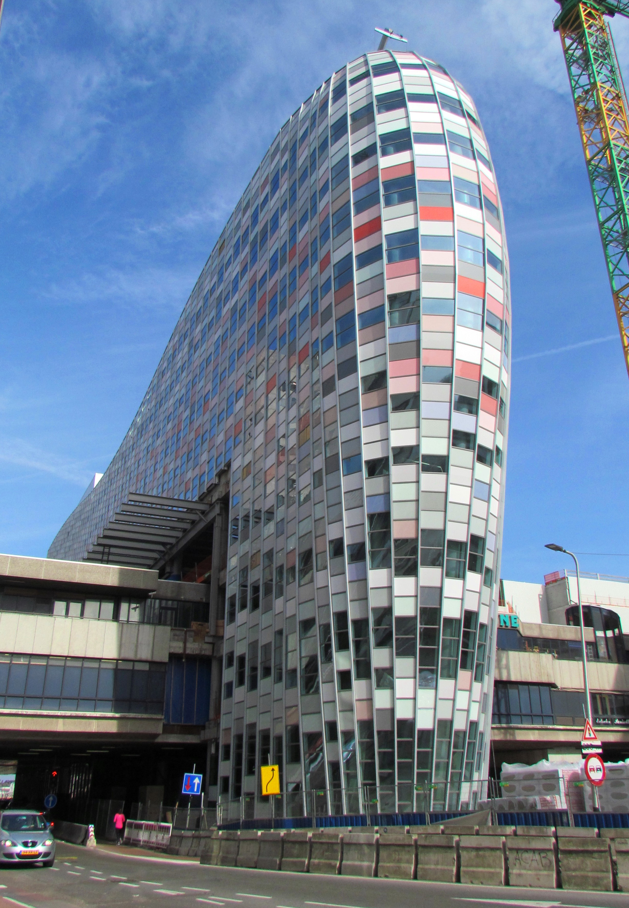 Poortgebouw in het stationsgebied van de Nederlandse stad Utrecht, zuidzijde